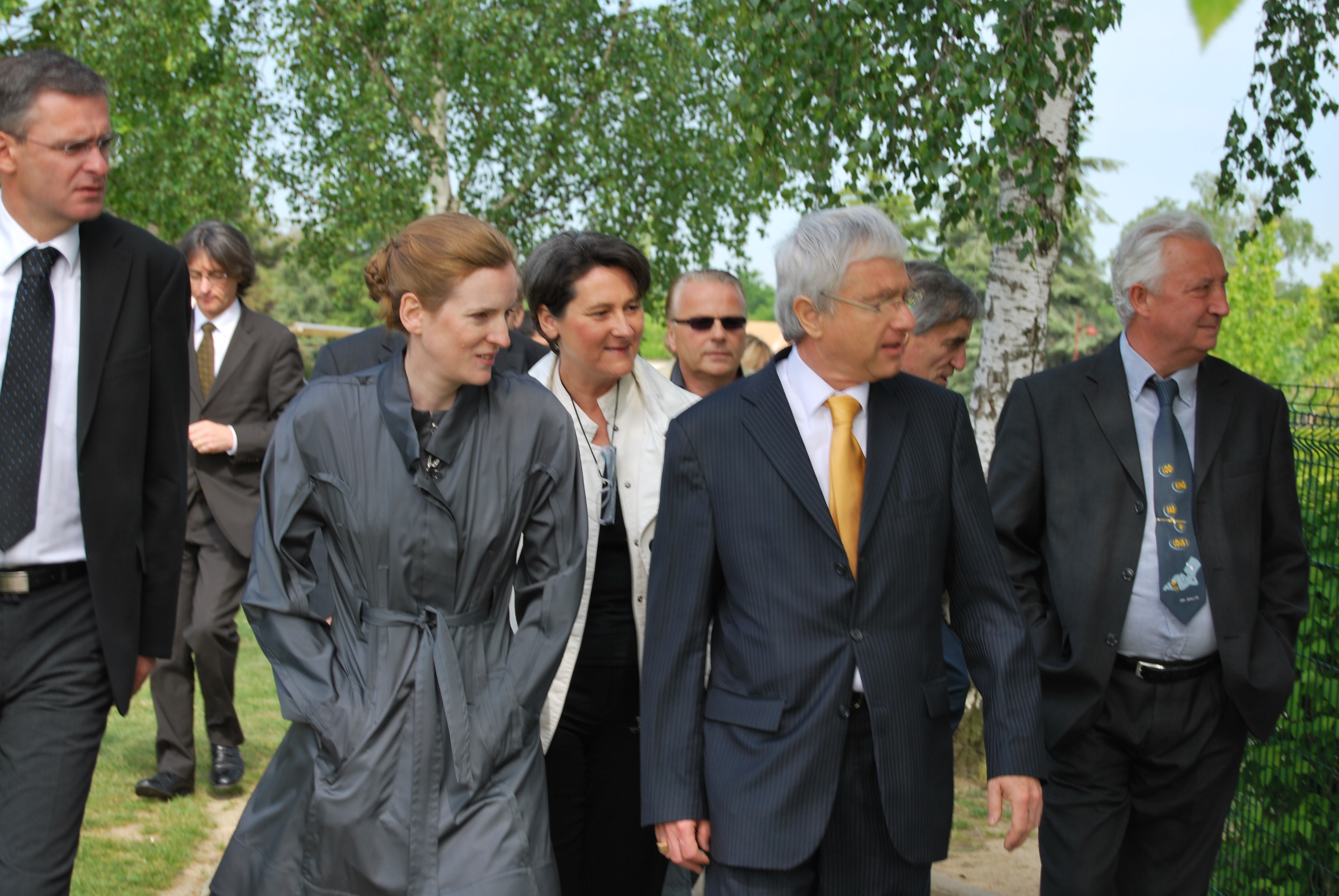 arret de la television analogique en pays de loire. visite de Nathalie Kosciusko-Morizetà saint georges du bois